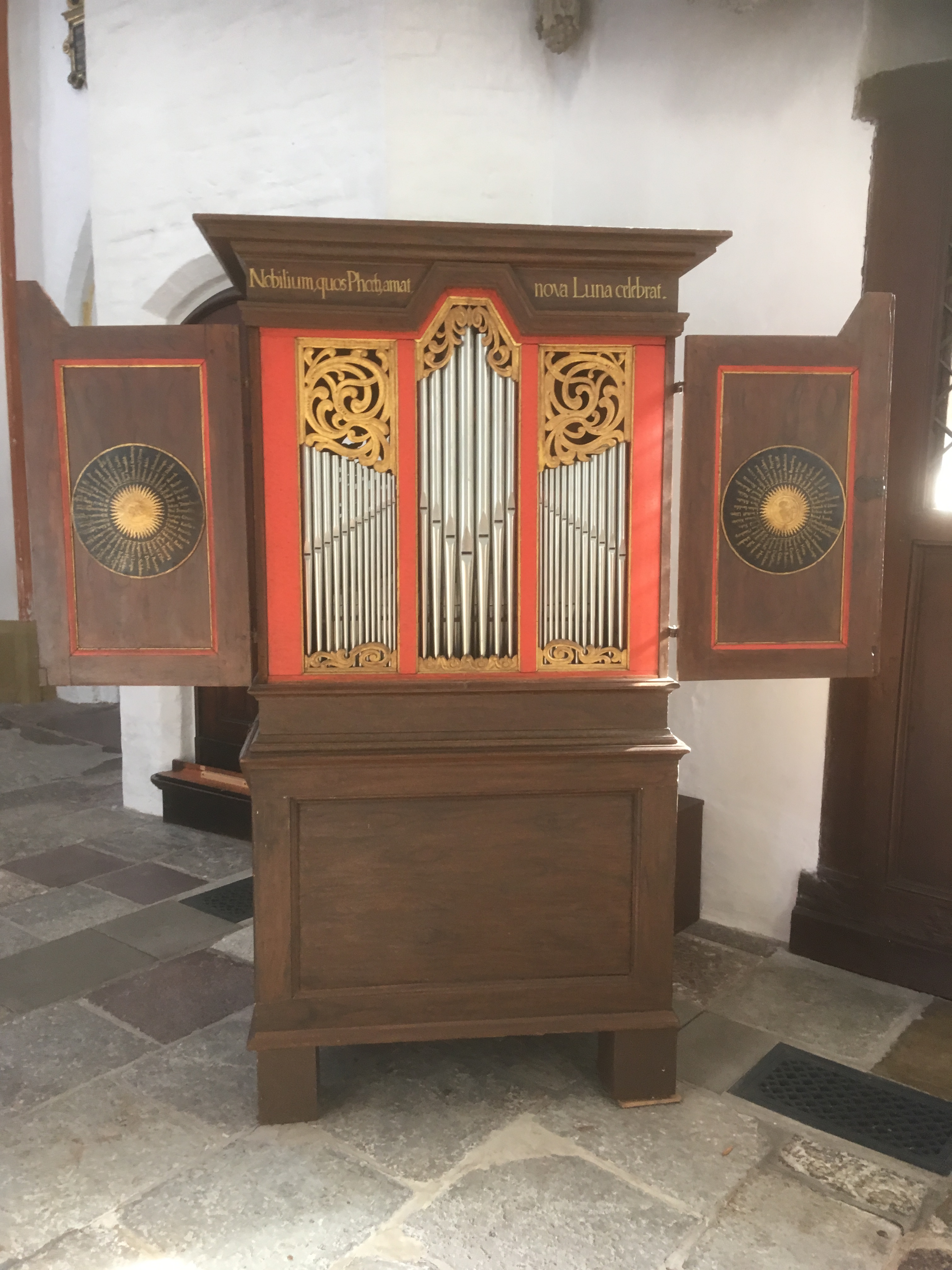 Richborn-Positiv in St. Jakobi Lübeck, Lübeck, Schleswig-Holstein, Deutschland